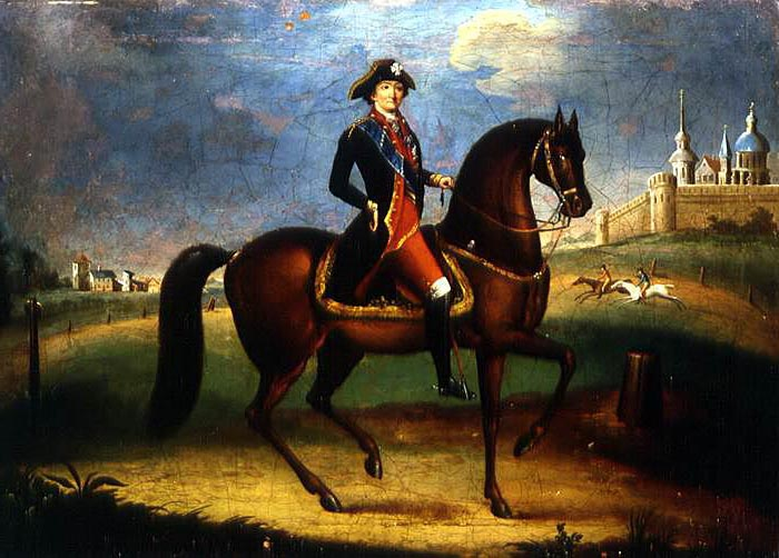 Дмитрий Невзоров. А. Г. Орлов-Чесменский на Свирепом. Не ранее 1796 г.